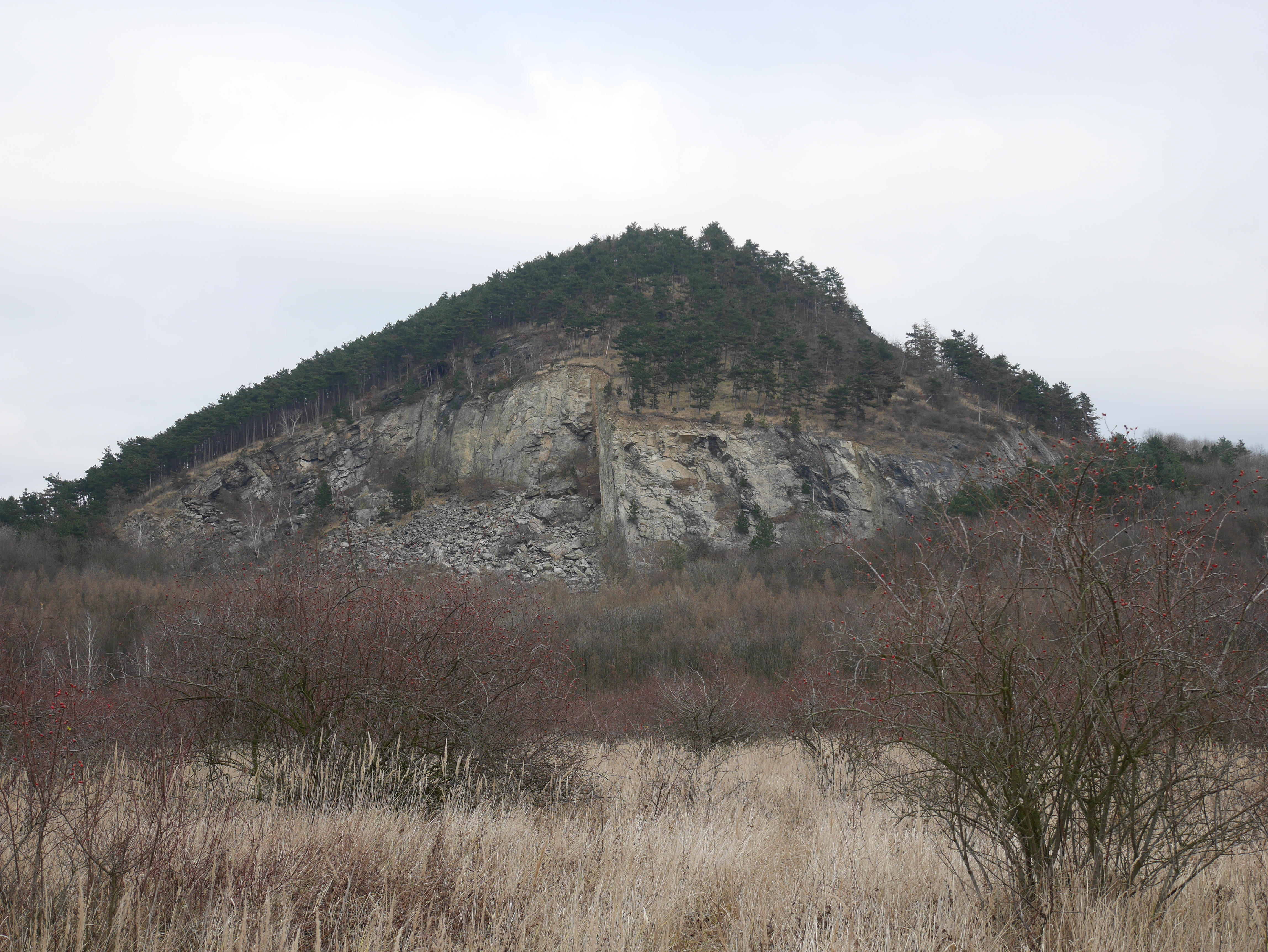 vrch Špičák ze strany bývalého lomu (25. 12. 2017)